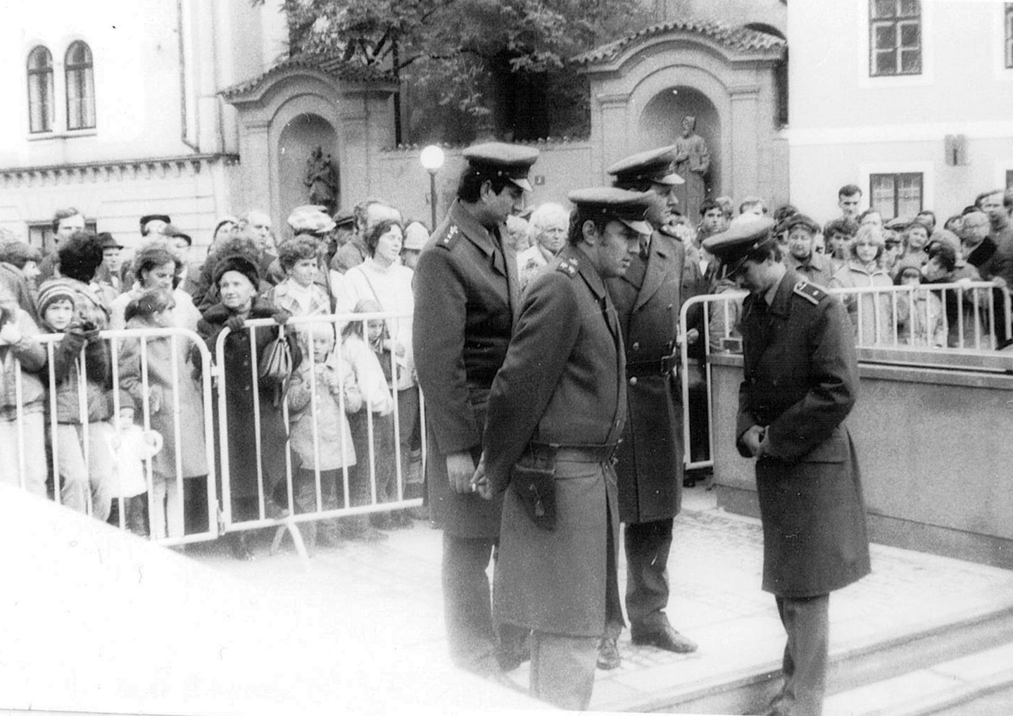 Praha, náměstí Republiky, Veřejná bezpečnost asistuje při otevírání trasy metra B.